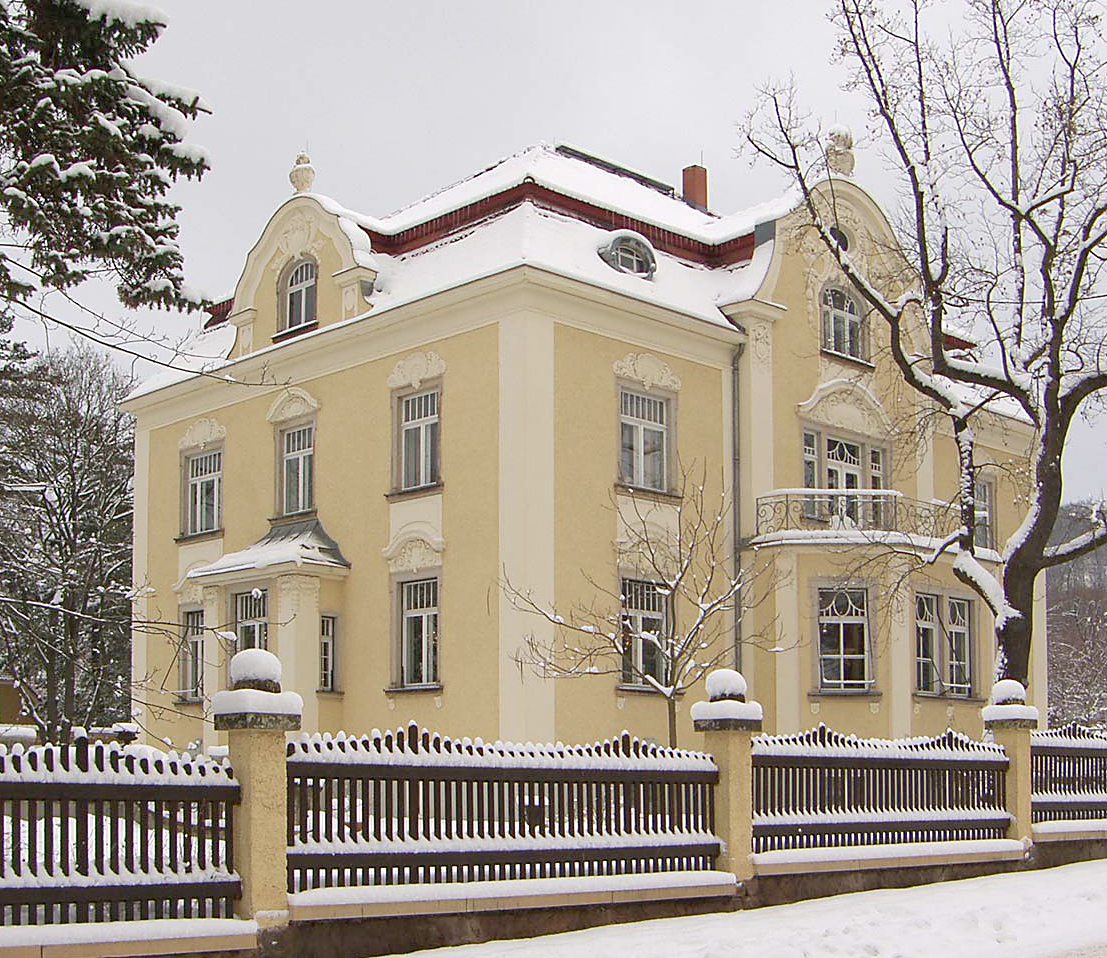 Radebeul, Villa Fabrikant Sommer